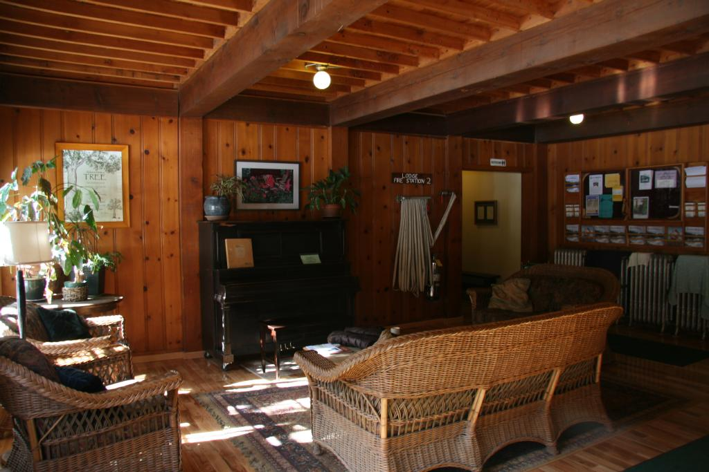 Breitenbush in Winter